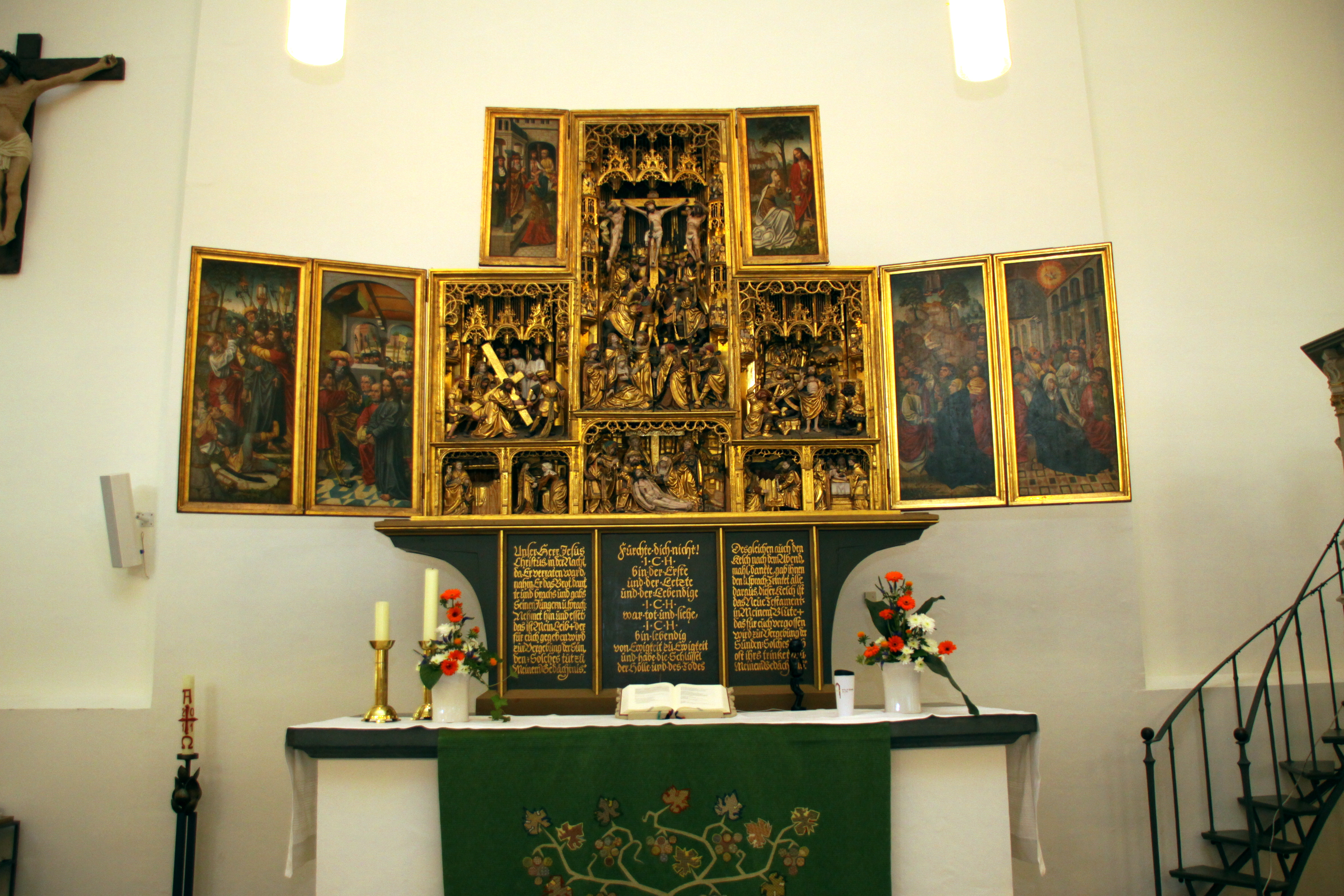 Der Ihlower Altar in der Lambertikirche Aurich